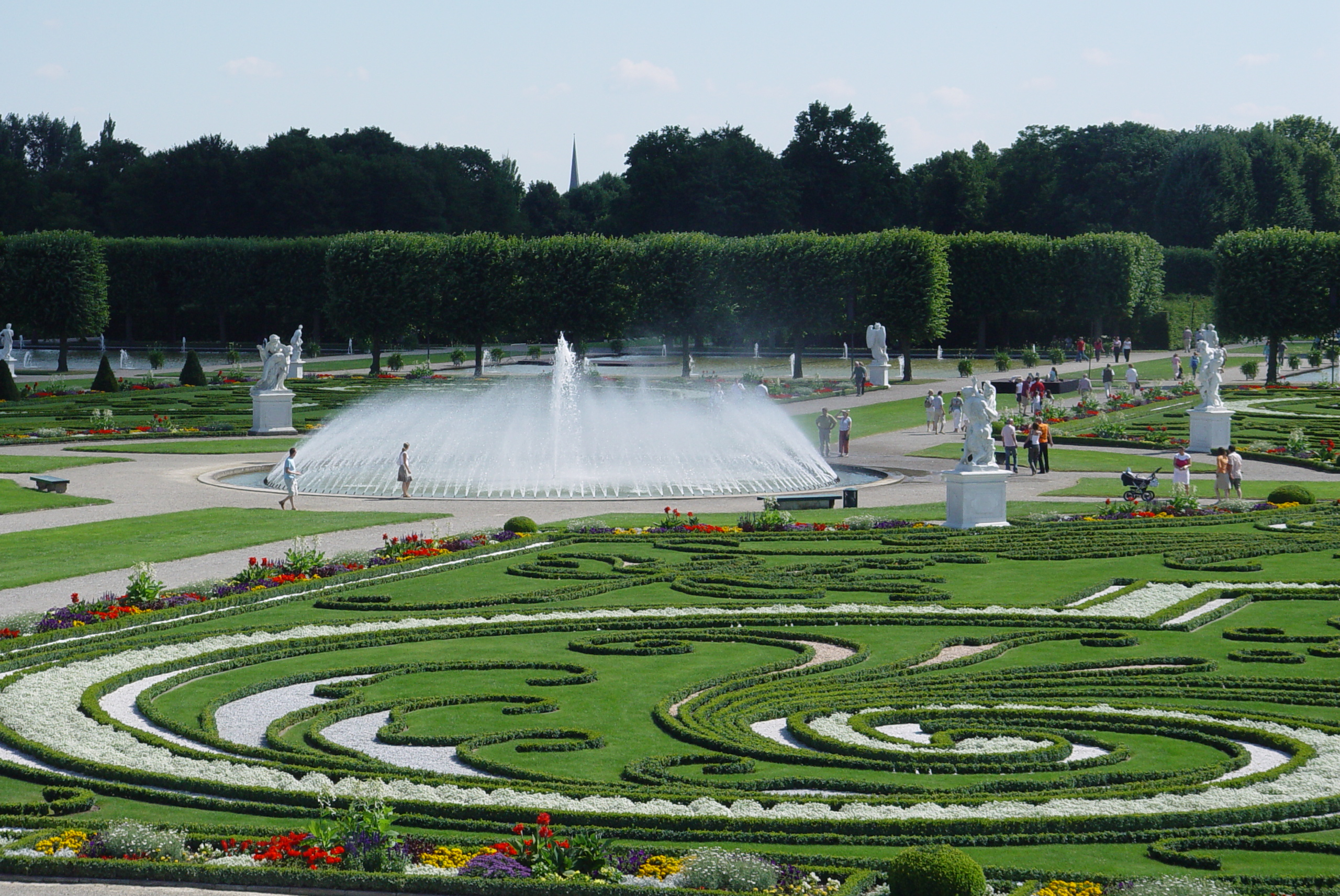 Großer Brunnen in den Herrenhäuser Gärten.